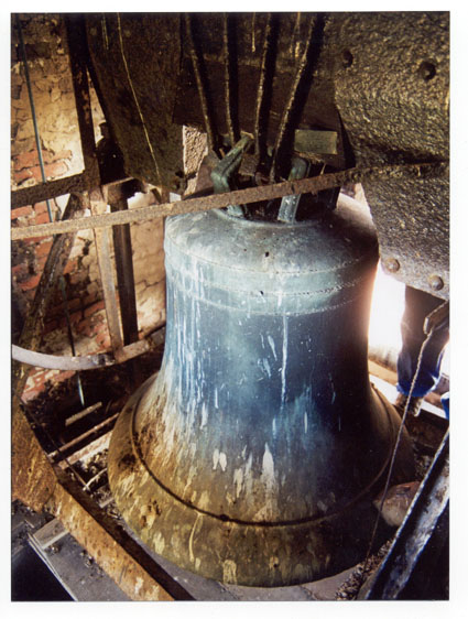 zelf gemaakt